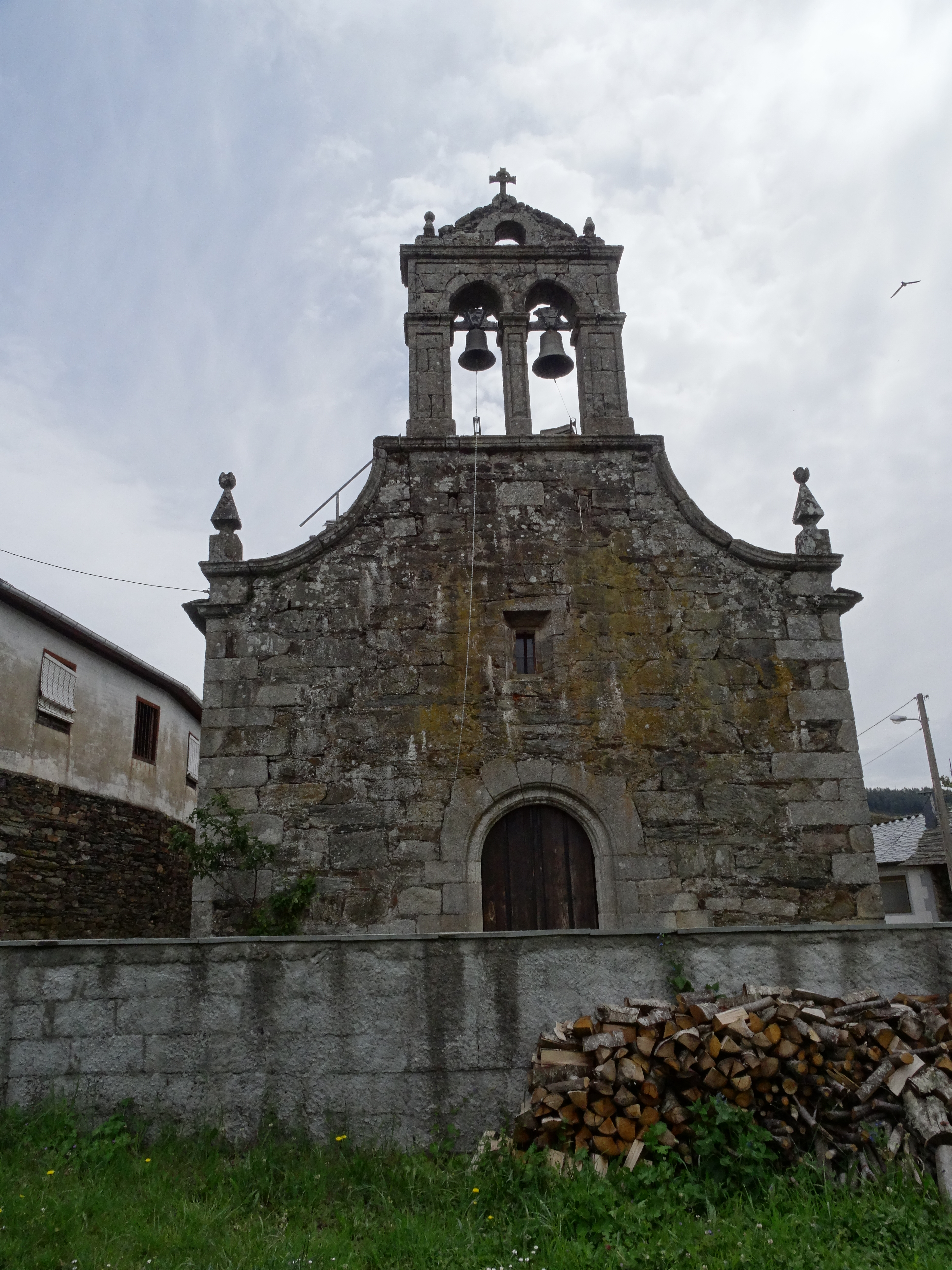 Ver título.